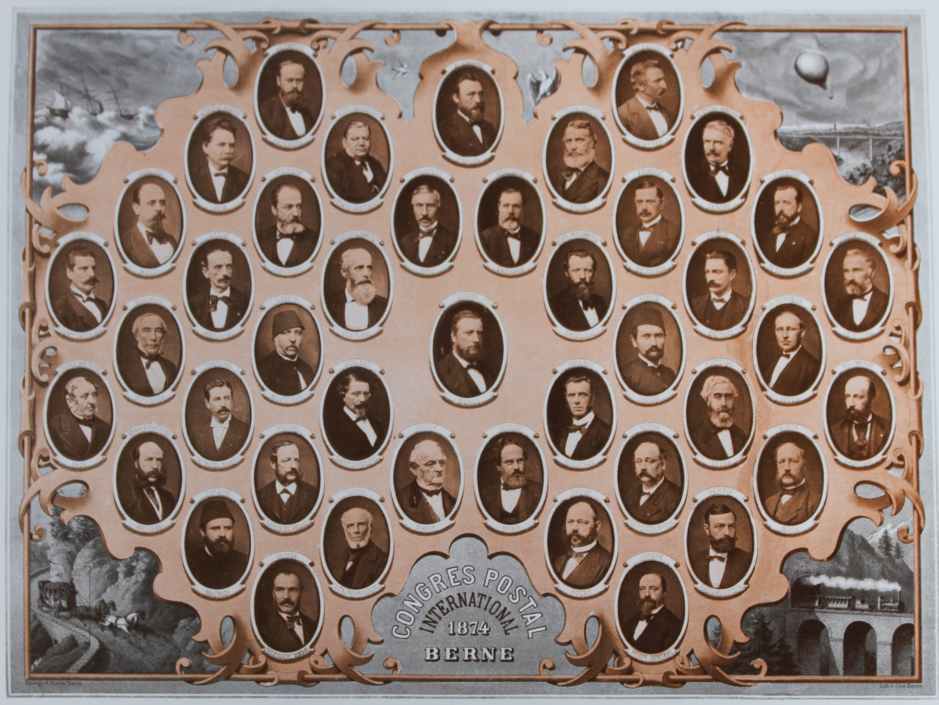 Congres Postal International 1874 (Das Original befindet sich im Museum für Kommunikation Frankfurt)